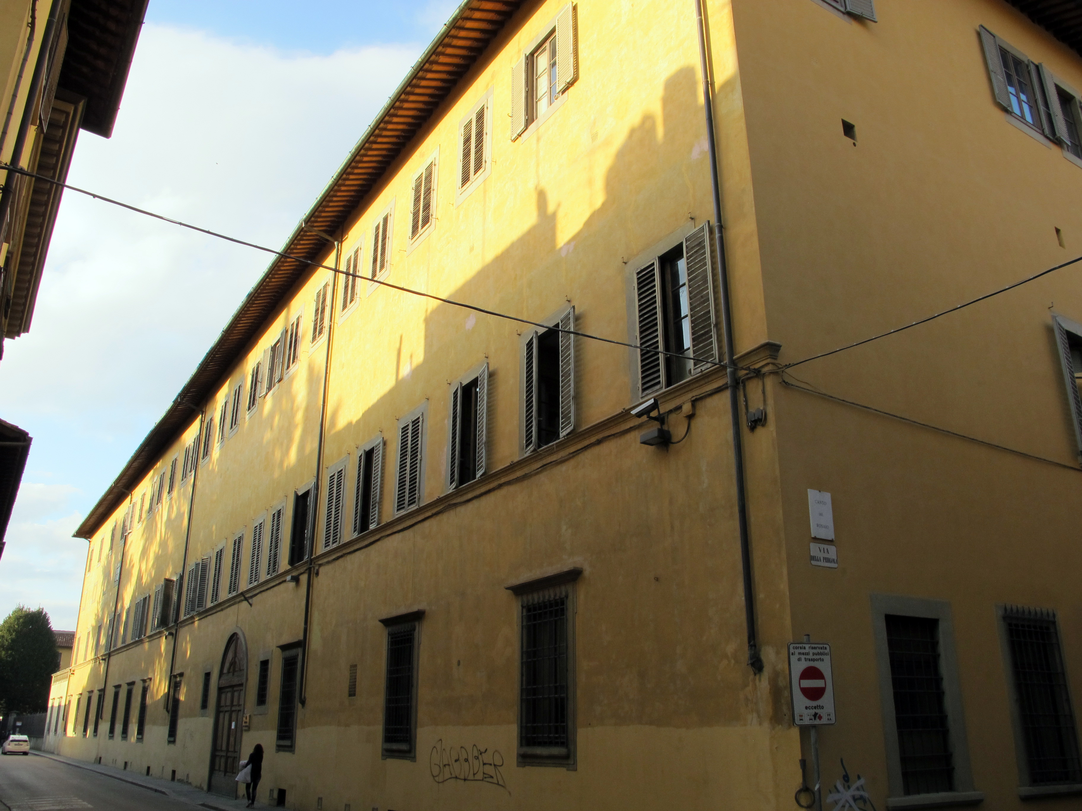 Via della Colonna, Firenze